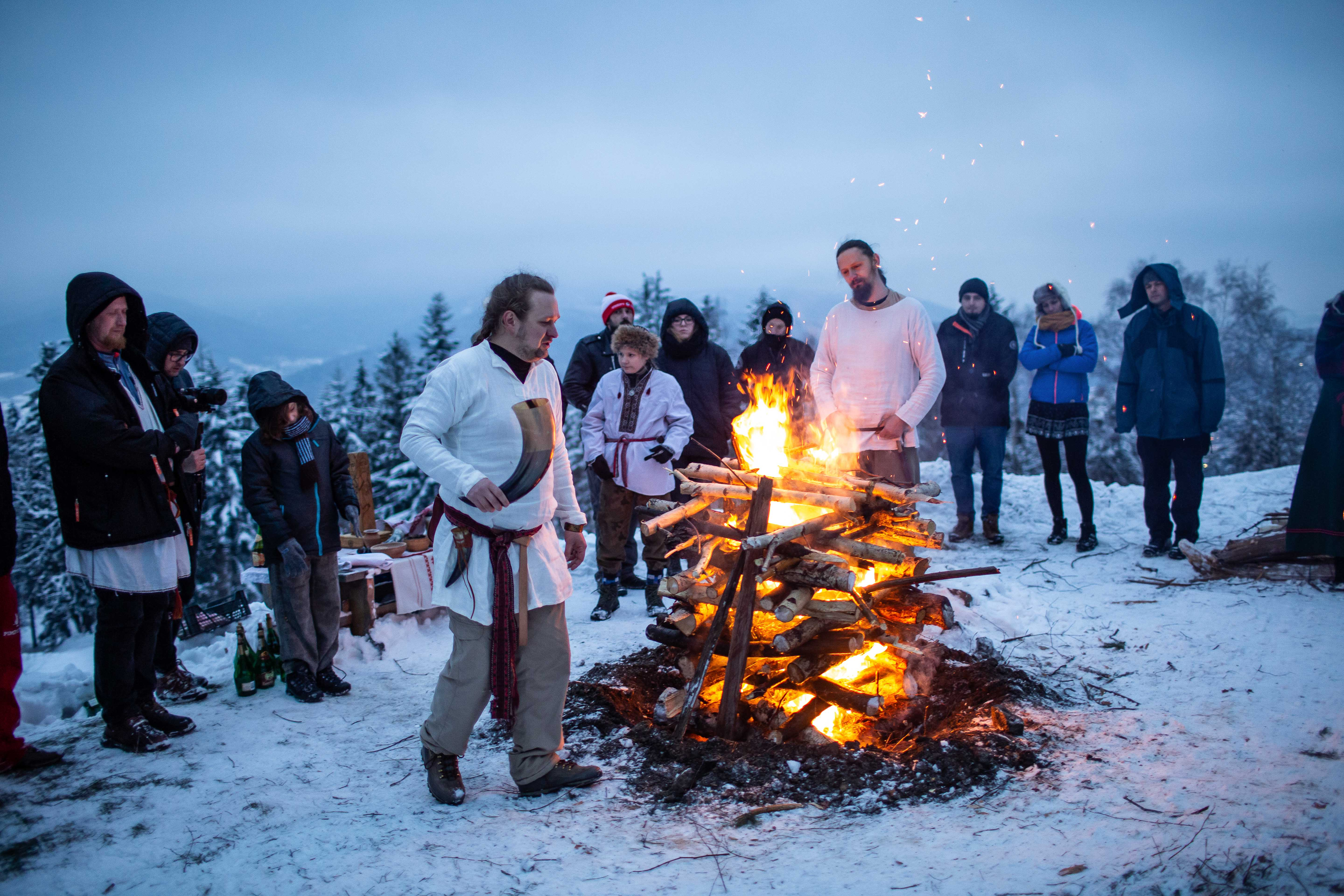 Szczodre Gody MIR